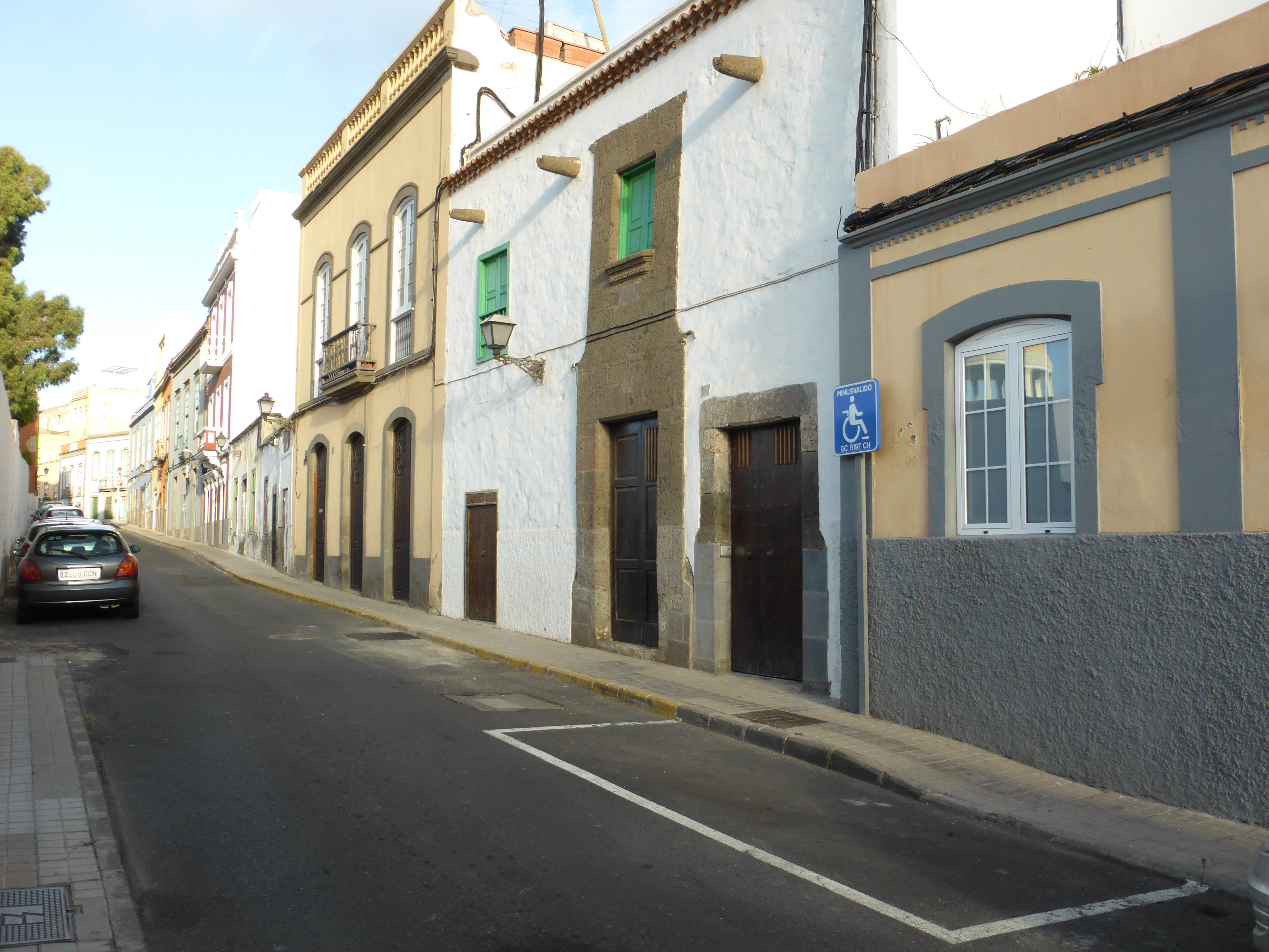 En la calle Ramón y Cajal, nº 25, del barrio de Vegueta, de Las Palmas de Gran Canaria, se encuentra esta antigua casa (en el centro de la fotografía) con elementos de cantería en su fachada, y ventanas pintadas en verde. Fue la vivienda del desaparecido etnógrafo e historiador José Antonio Pérez Cruz ("Teno"), fallecido en agosto de 2016.